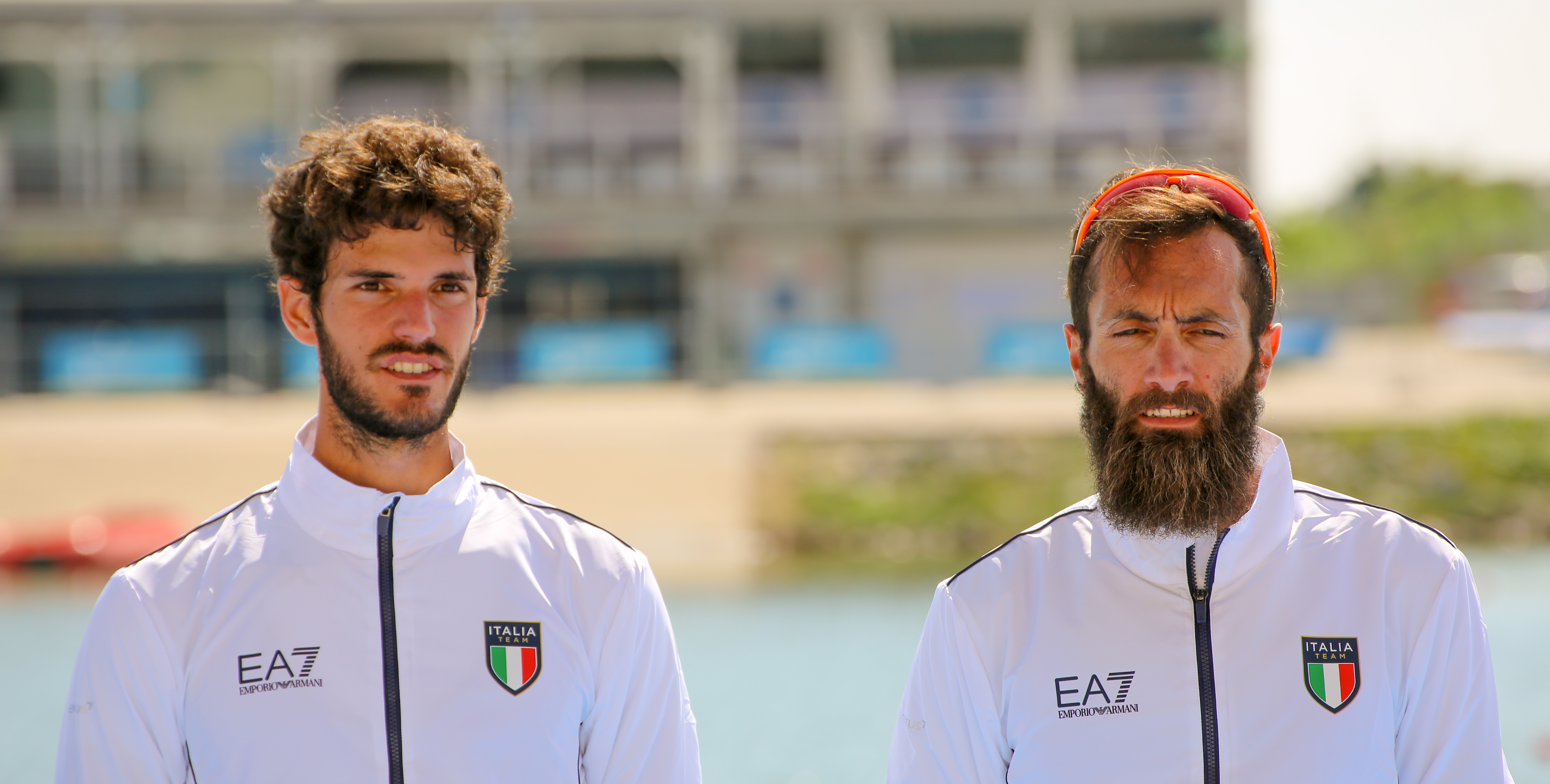 Stefano Oppo y Pietro Ruta, oro en los Juegos del Mediterráneo 2018